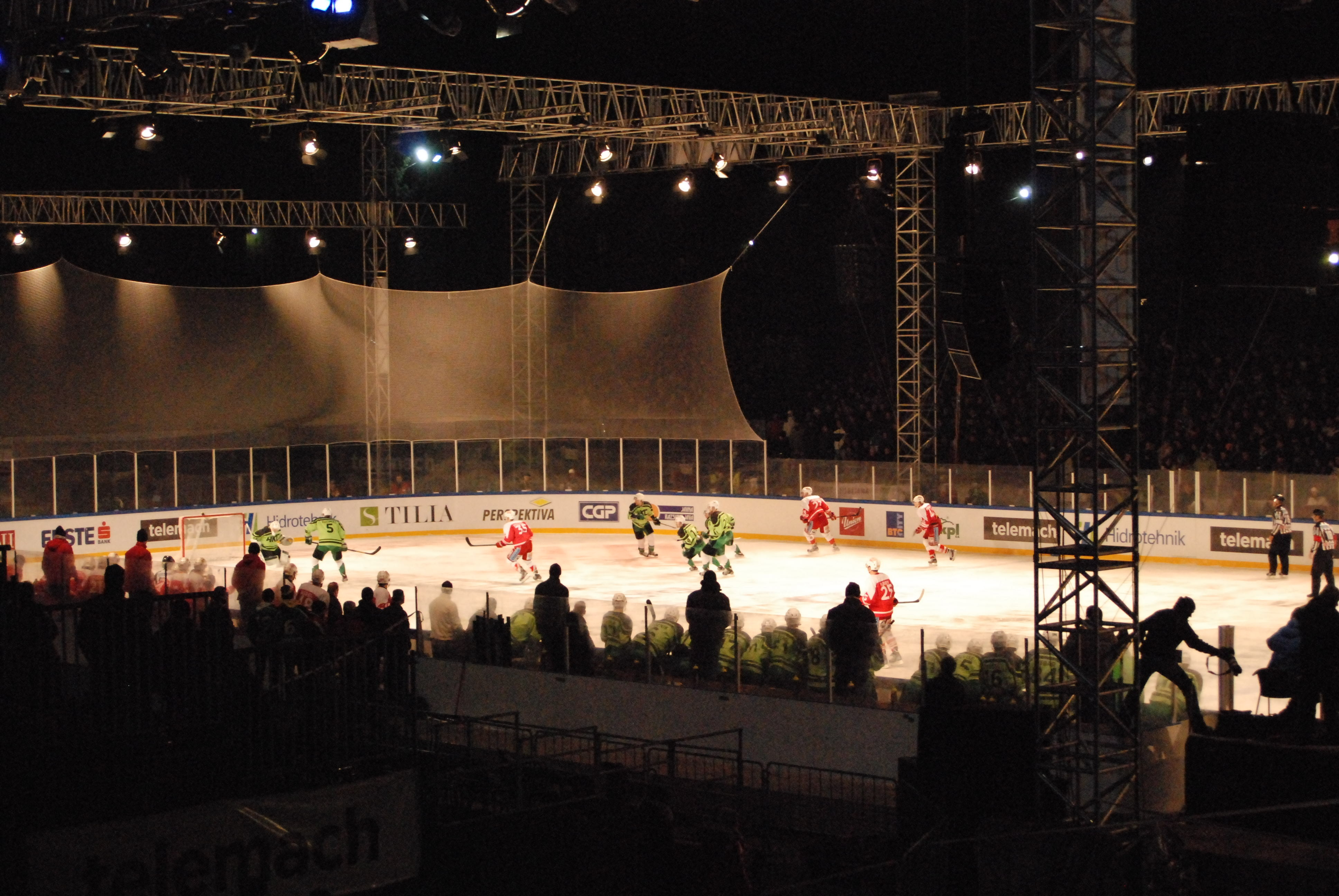 Hokejska tekma med HDD Telemach Olimpijo (Ljubljana) in EC KAC (Celovec) na Plečnikovem štadionu v Ljubljani.